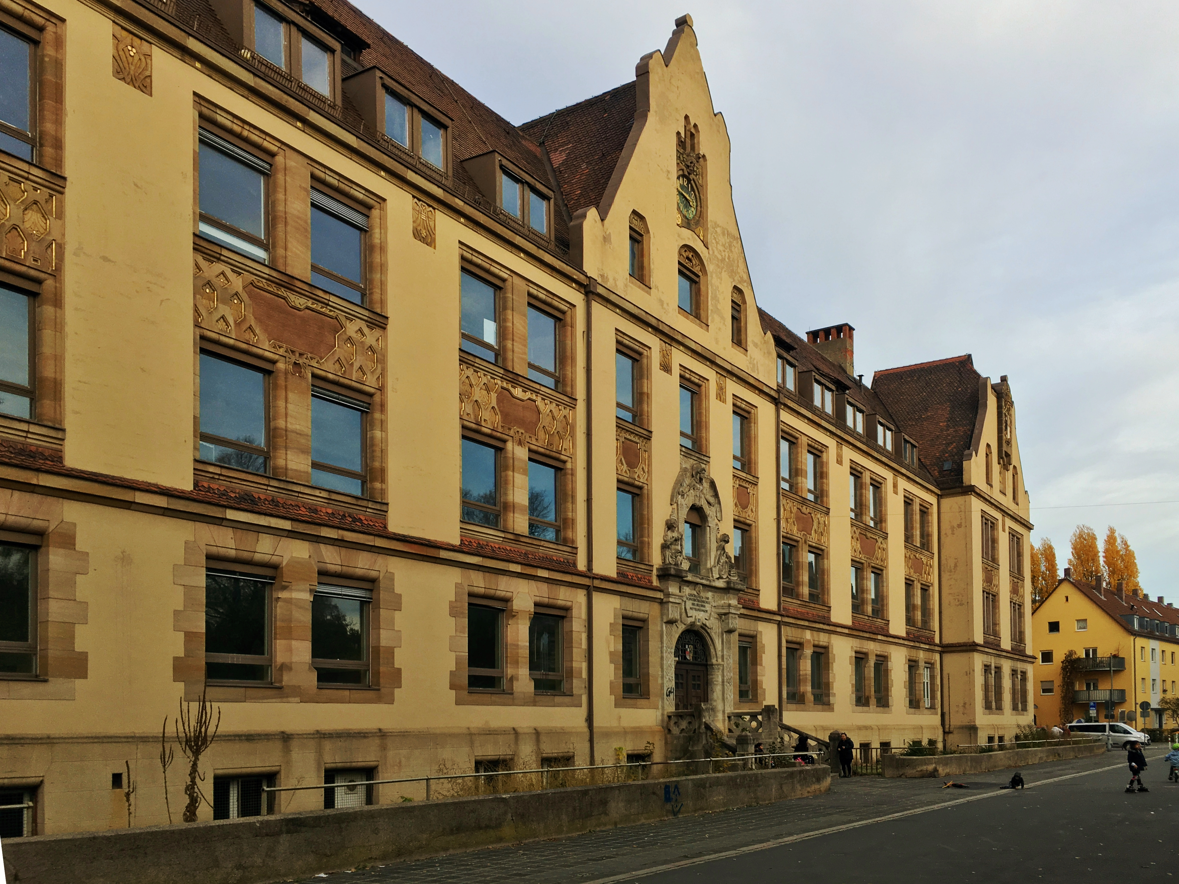 Heinickeplatz in Nürnberg 2018